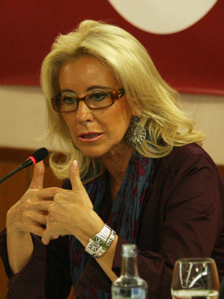 Coloquio con Corina Porro, candidata a la alcaldía de Vigo por el Partido Popular. El evento fue organizado por la asociación cívica Vigueses por la Libertad, con motivo de las elecciones municipales que se celebran en España. Discussion with Corina Porro Discussion with Corina Porro, a candidate for mayor of Vigo for the Partido Popular (Peoples Party). The event was organized by the civic association Vigueses por la Libertad (Vigueses for Freedom), during the municipal elections held in Spain.